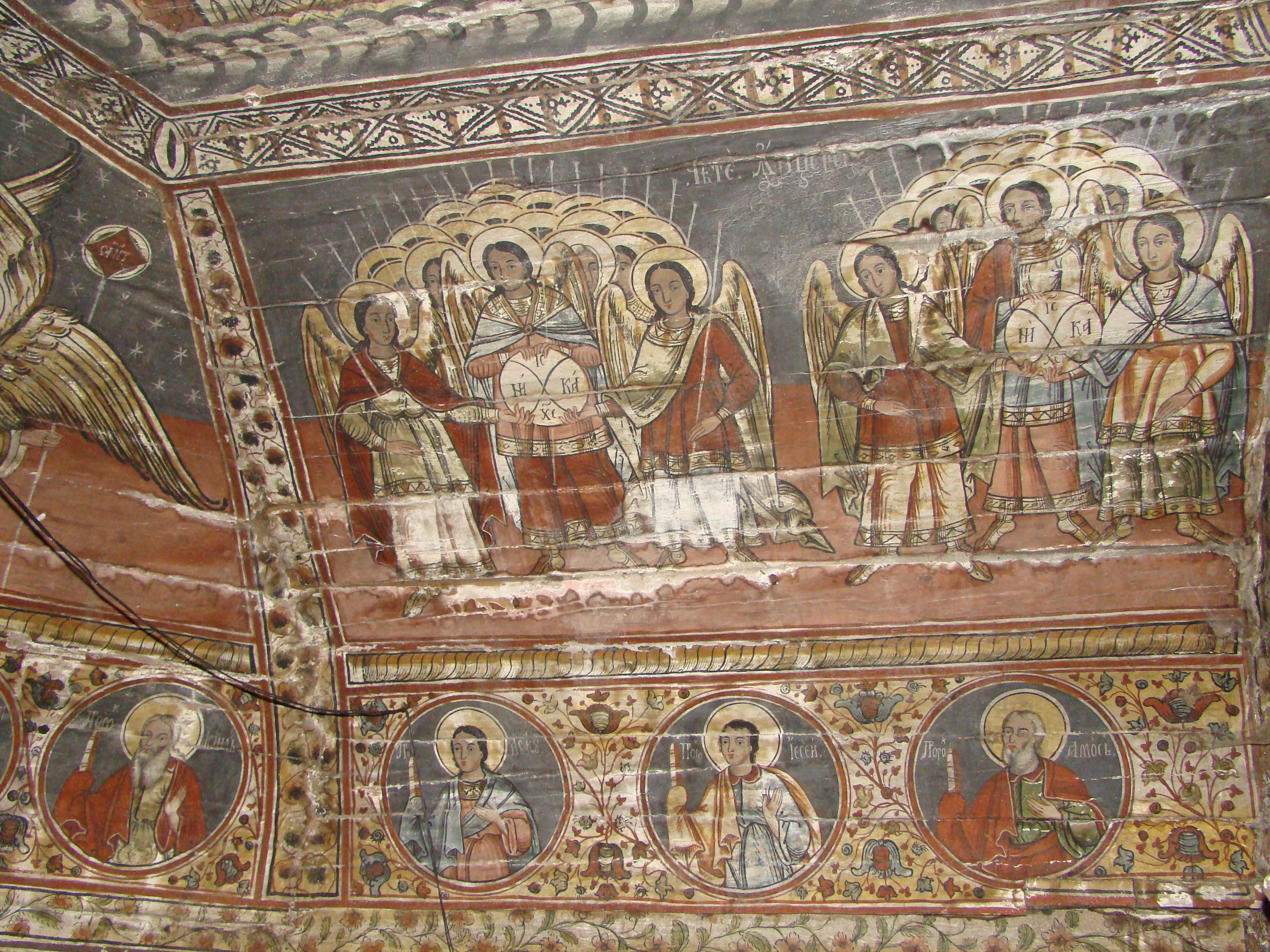 Biserica de lemn din Valea Largă-Alba